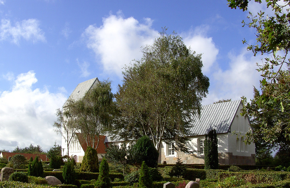 fra sydøst